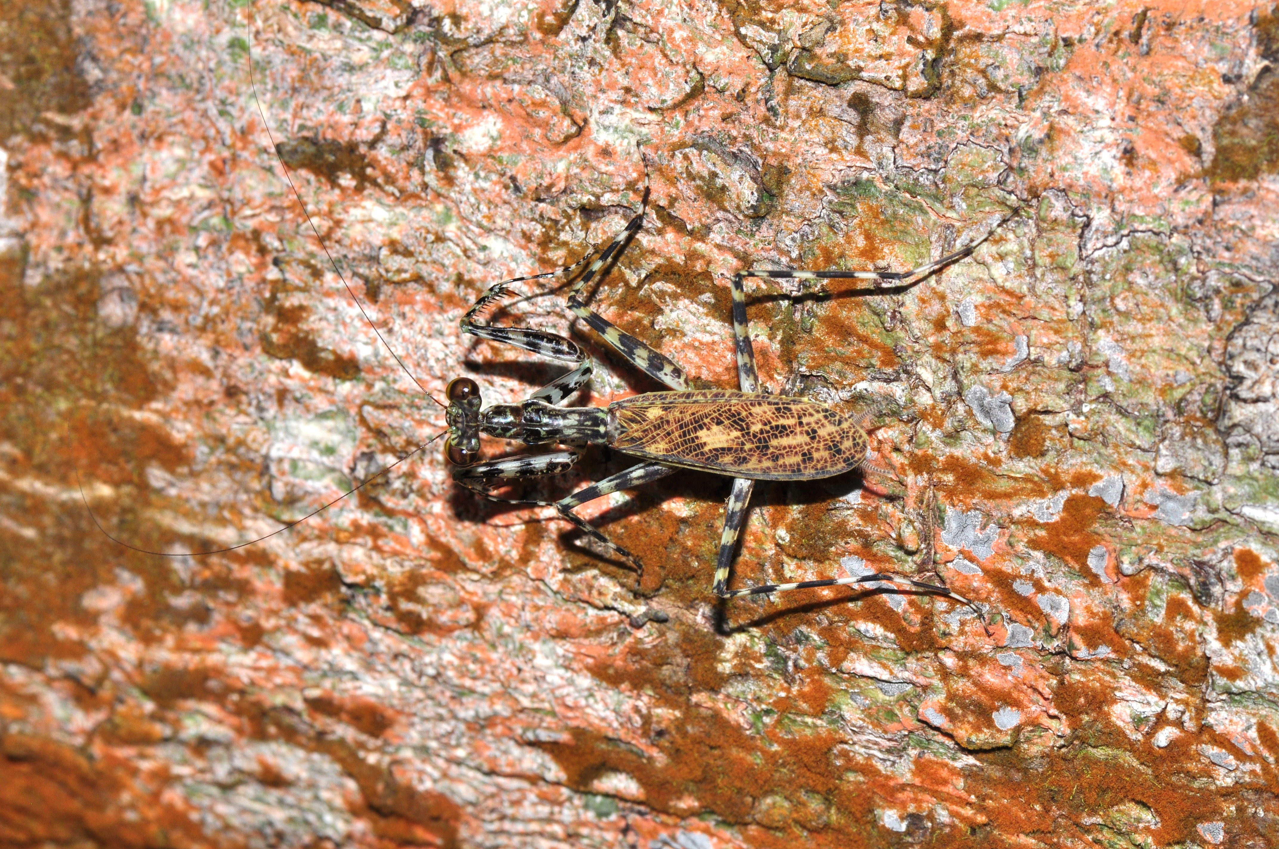 Lichen mantis Liturgusa sp.